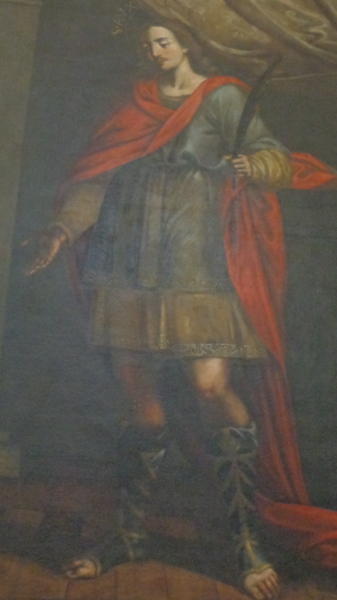 Pasqua 2016 57